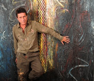 Portrait von Bernd Fasching